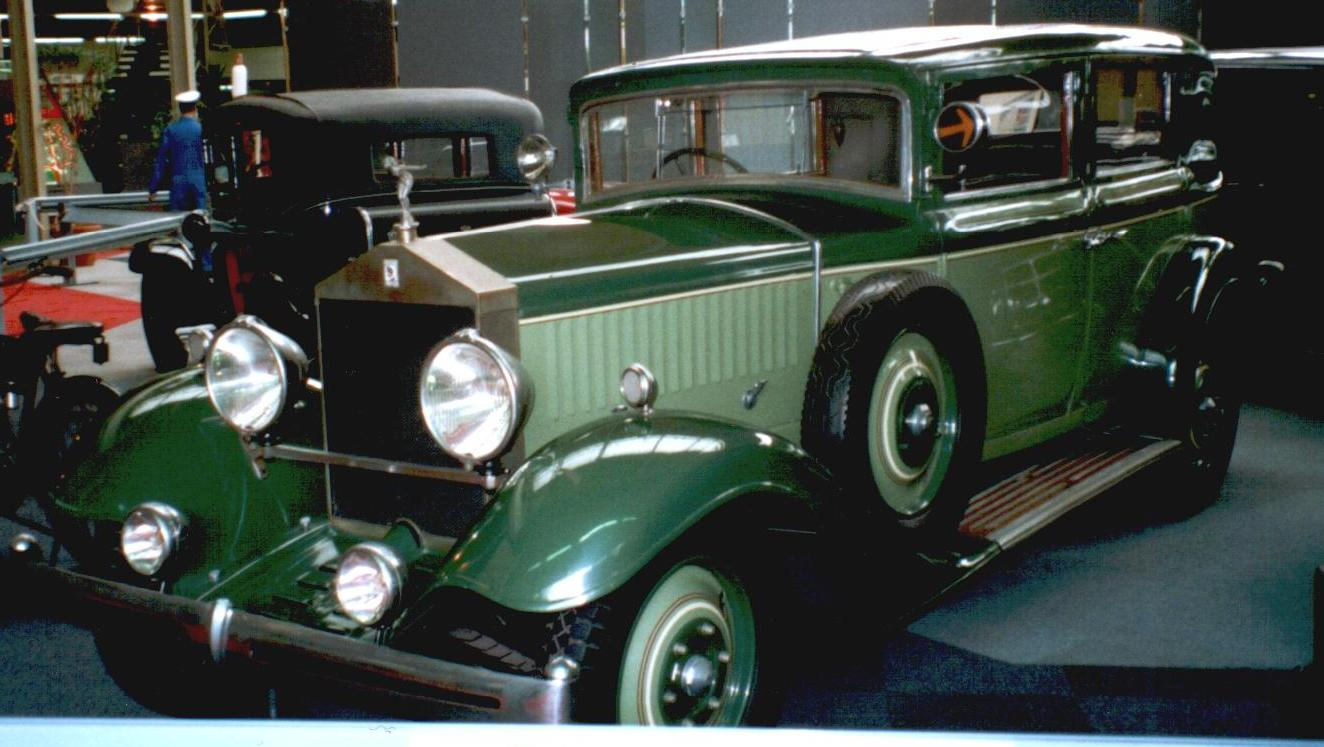 Belga-Rise 1934